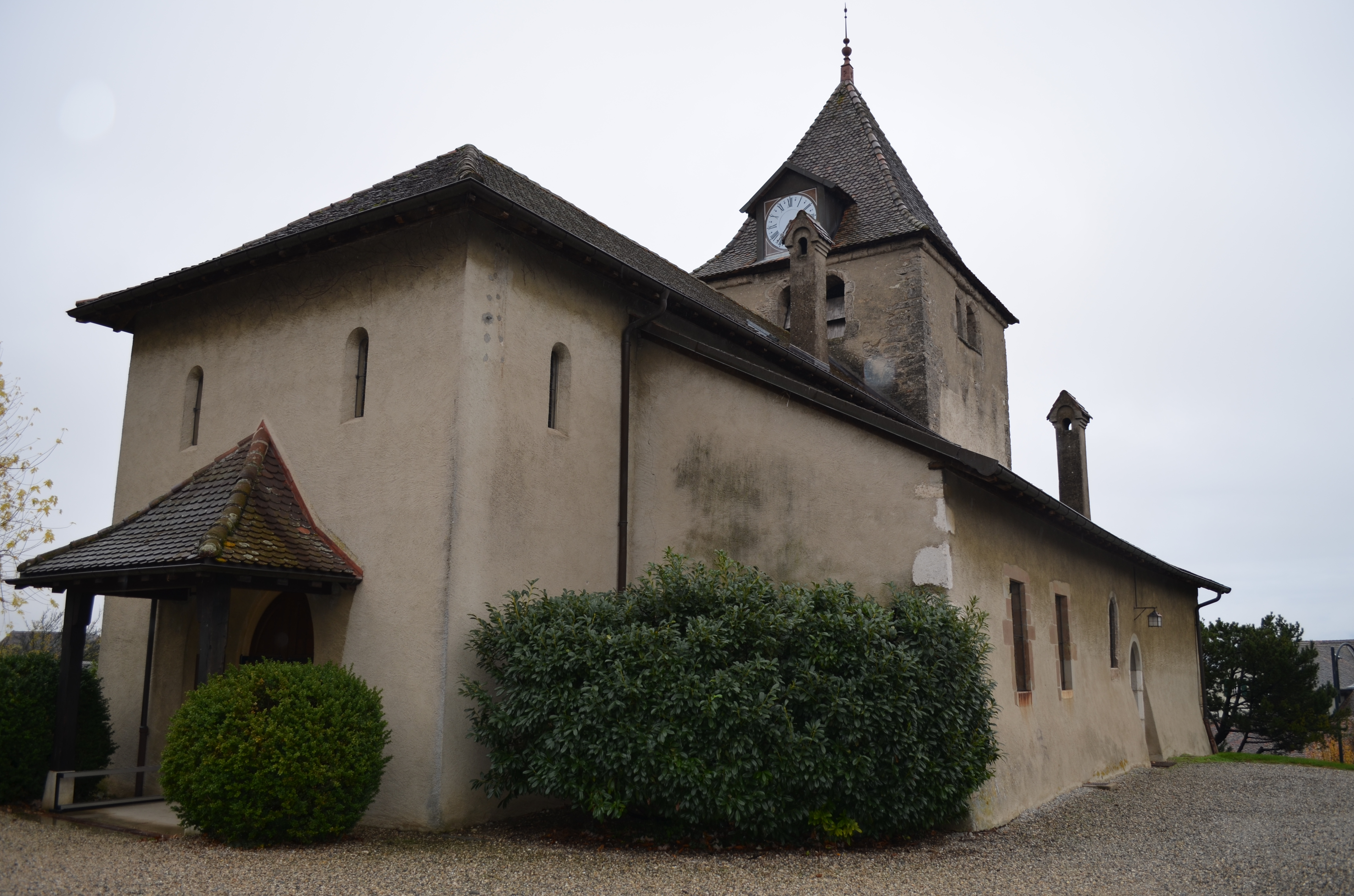 Begnins, Eglise réformée